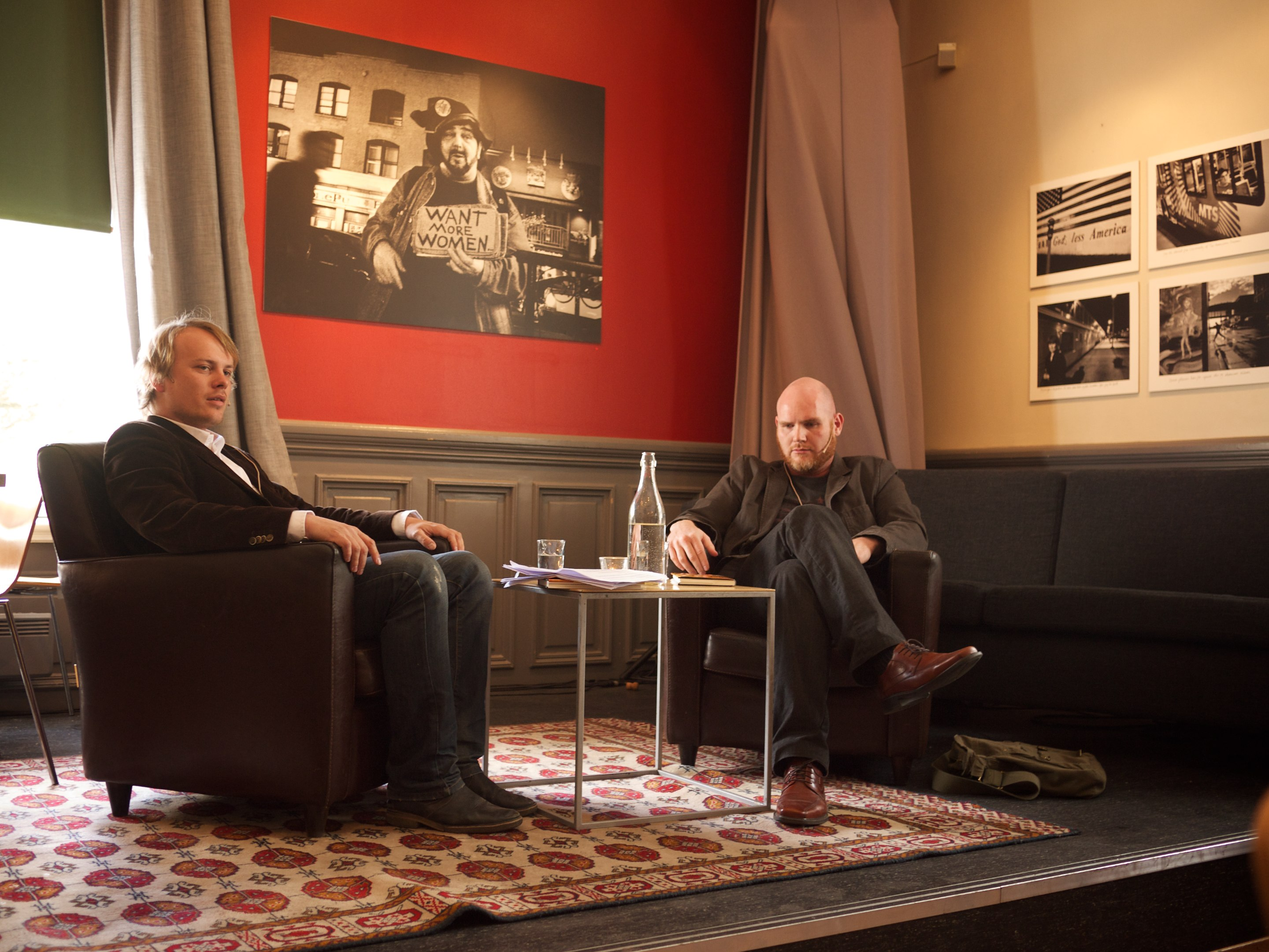 Samtale mellom Endre Ruset og Jan Roar Leikvoll